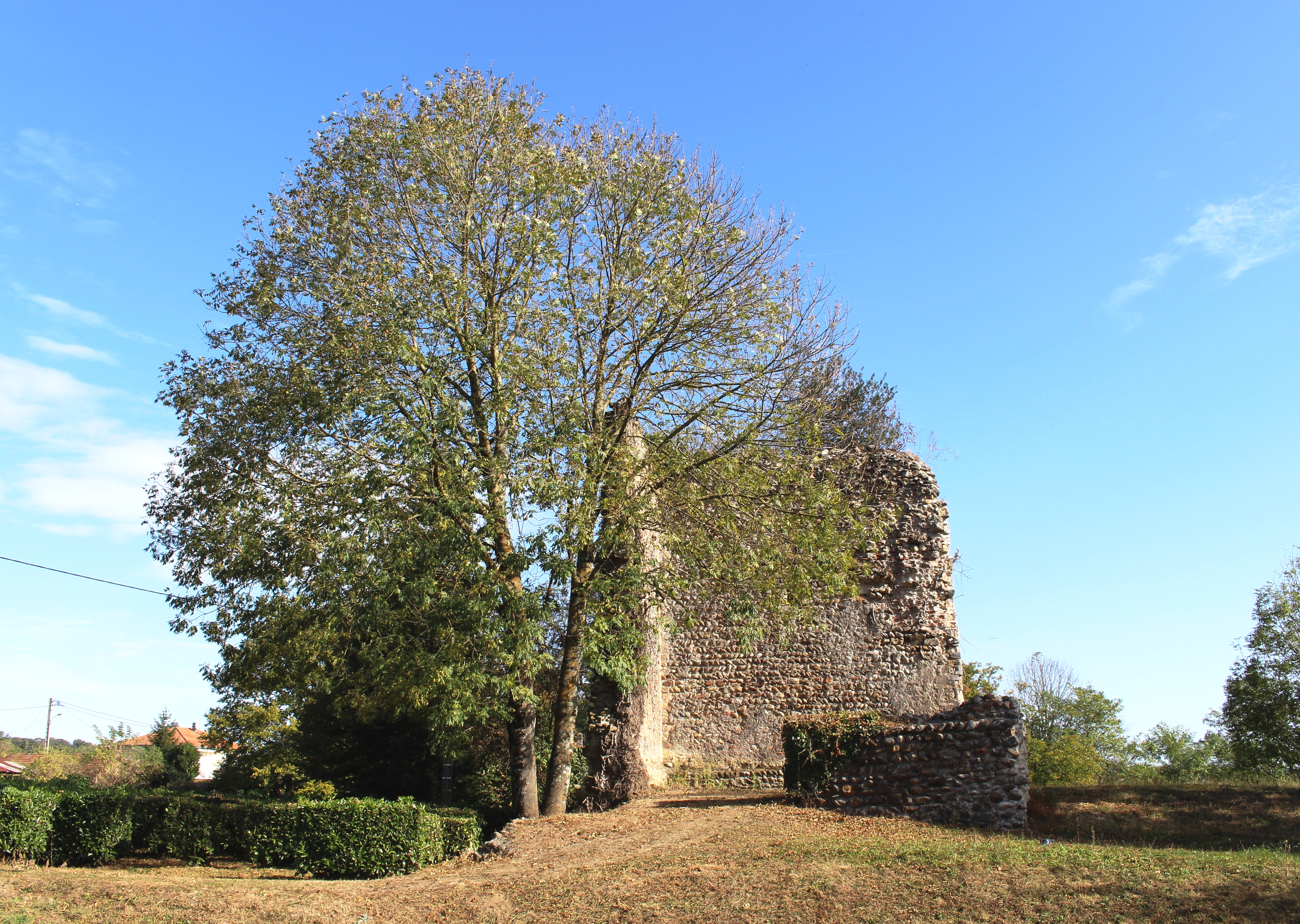 Château de La Barthe-de-Neste (Hautes-Pyrénées)